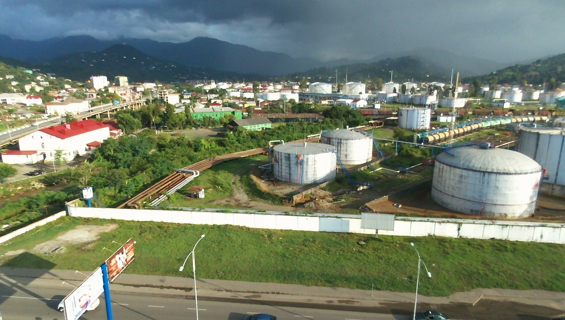 Ten materiał wykonano dronem Parrot Bebop Drone dzięki współpracy z firmą Parrot Polska.Materiały wykonane tym sprzętem możesz zobaczyć w kategorii: Taken with Parrot Bebop Drone. English | polski | +/− The making of this document was supported by Wikimedia Polska. To zdjęcie zostało wykonane podczas Wikiwyprawy 2015.Wszystkie zdjęcia z wyprawy możesz zobaczyć w kategorii: Wikiwyprawa 2015. English | polski | +/− To zdjęcie zostało załadowane dzięki współpracy z firmą Hyperbook. polski | +/− To zdjęcie zostało załadowane dzięki współpracy z firmą: Kopex Group. English | polski | +/−